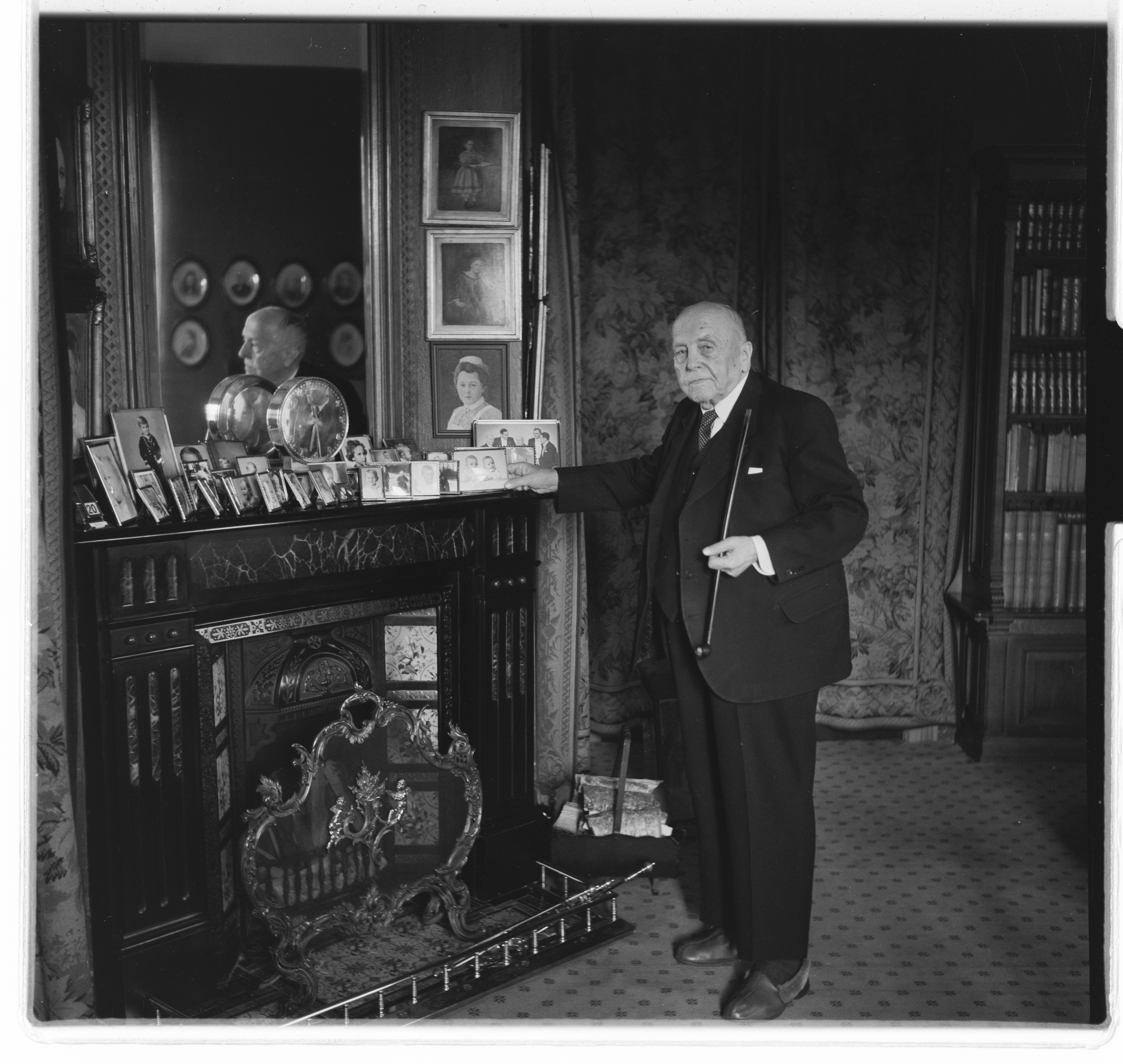 Bildet er hentet fra Arkivverket. Sigval Bergesen konsul. Bergesen d.e. Stavanger NÅ nr 23 Arkivinstitusjon : Riksarkivet Arkivnavn : Billedbladet NÅ Sted : Norge, Rogaland, Stavanger, Stavanger Emneord: Menn, Portretter Avbildet: Bergesen, Sigval